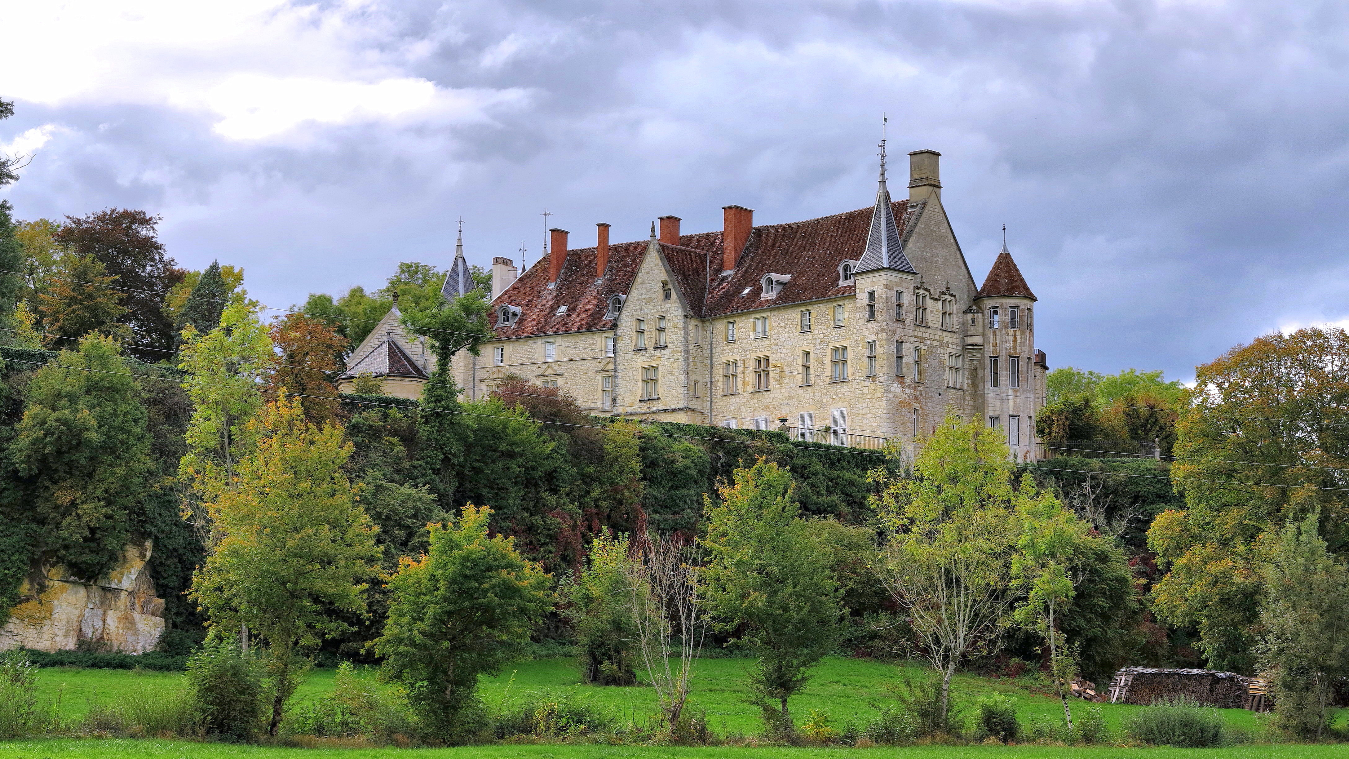 Château de Montrambert